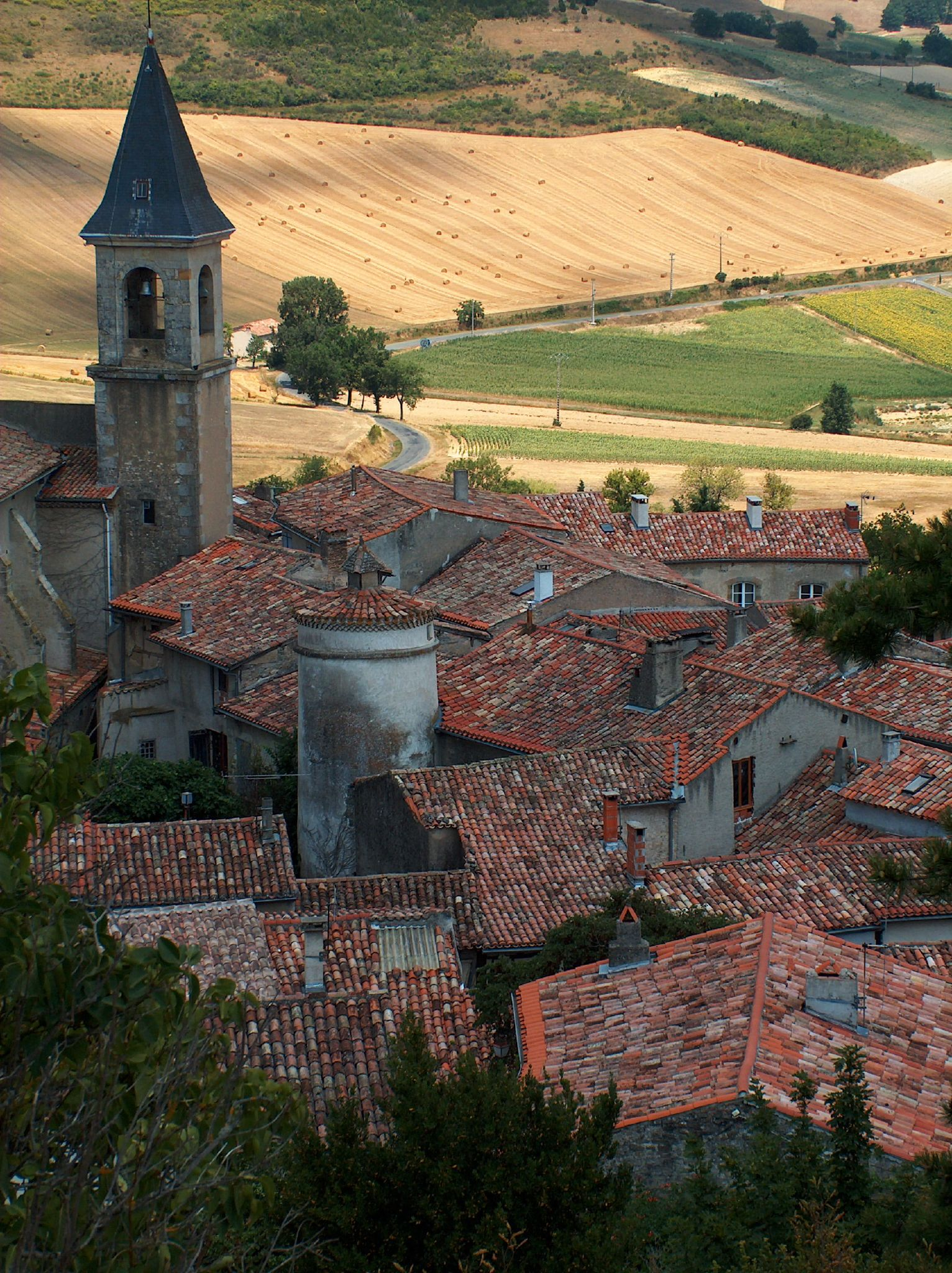 Lautrec